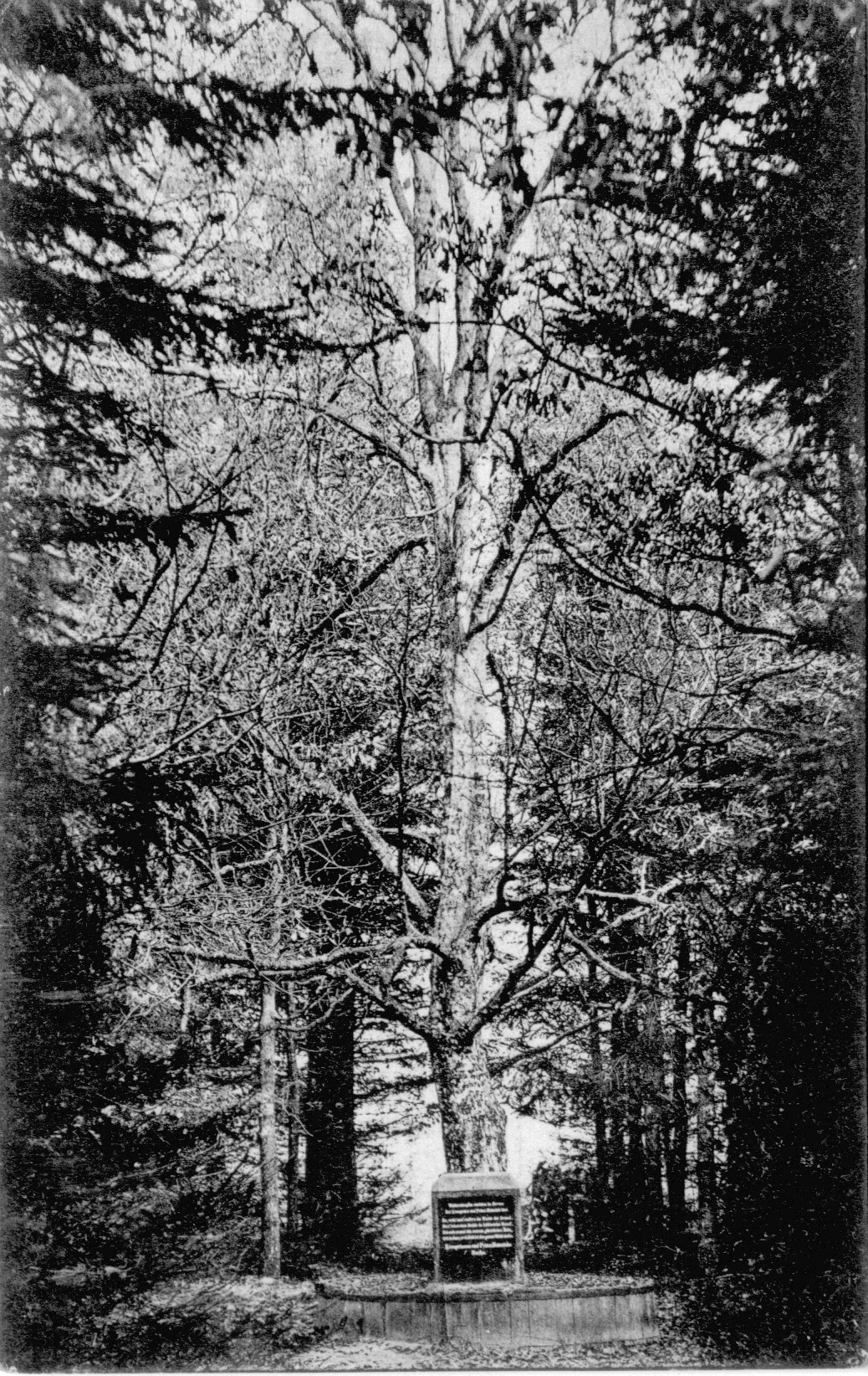 Das Bild zeigt die ursprüngliche Kronprinzenbuche im Spandauer Forst um 1910, mit Dank erhalten von